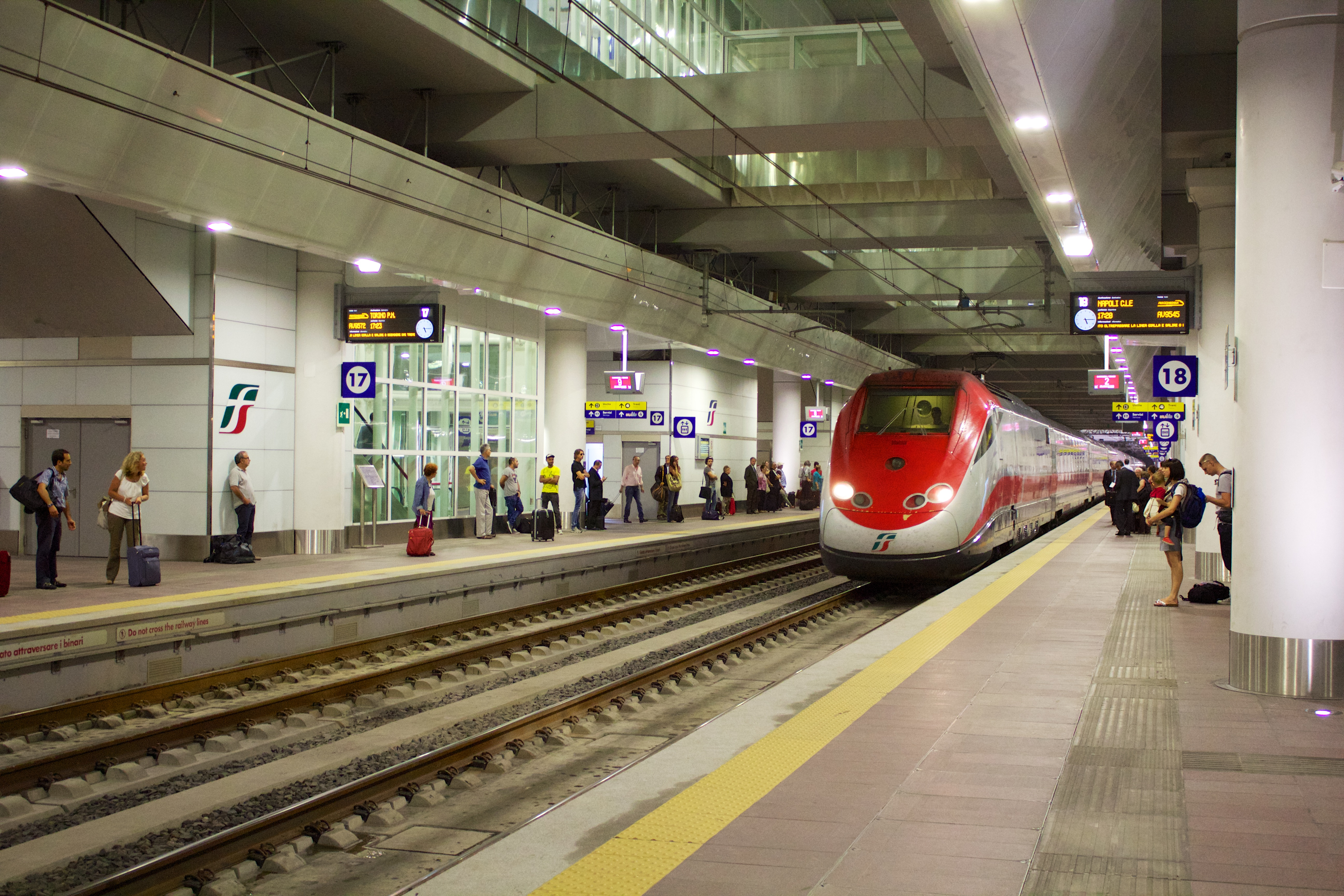 ETR 500 in arrivo a Bologna Centrale